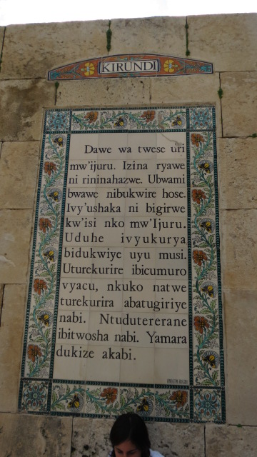 Church of the Pater Noster, Mount of Olives, Jerusalem, Israel כנסיית אבינו שבשמים Sanctuary of the Eleona